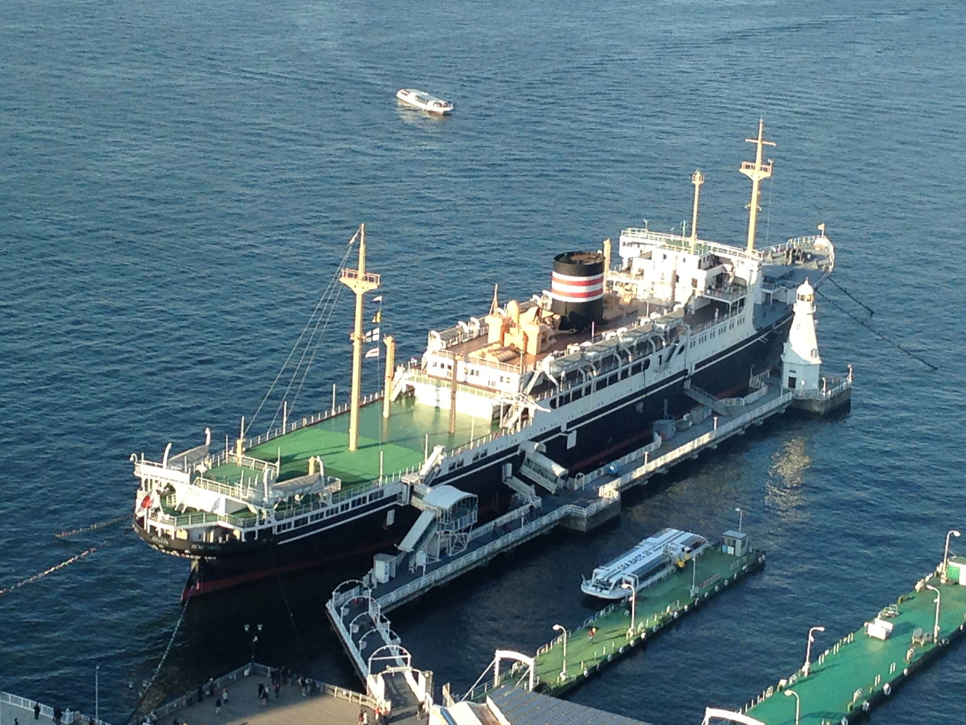 山下公園に係留されている氷川丸。横浜マリンタワーの展望台より。